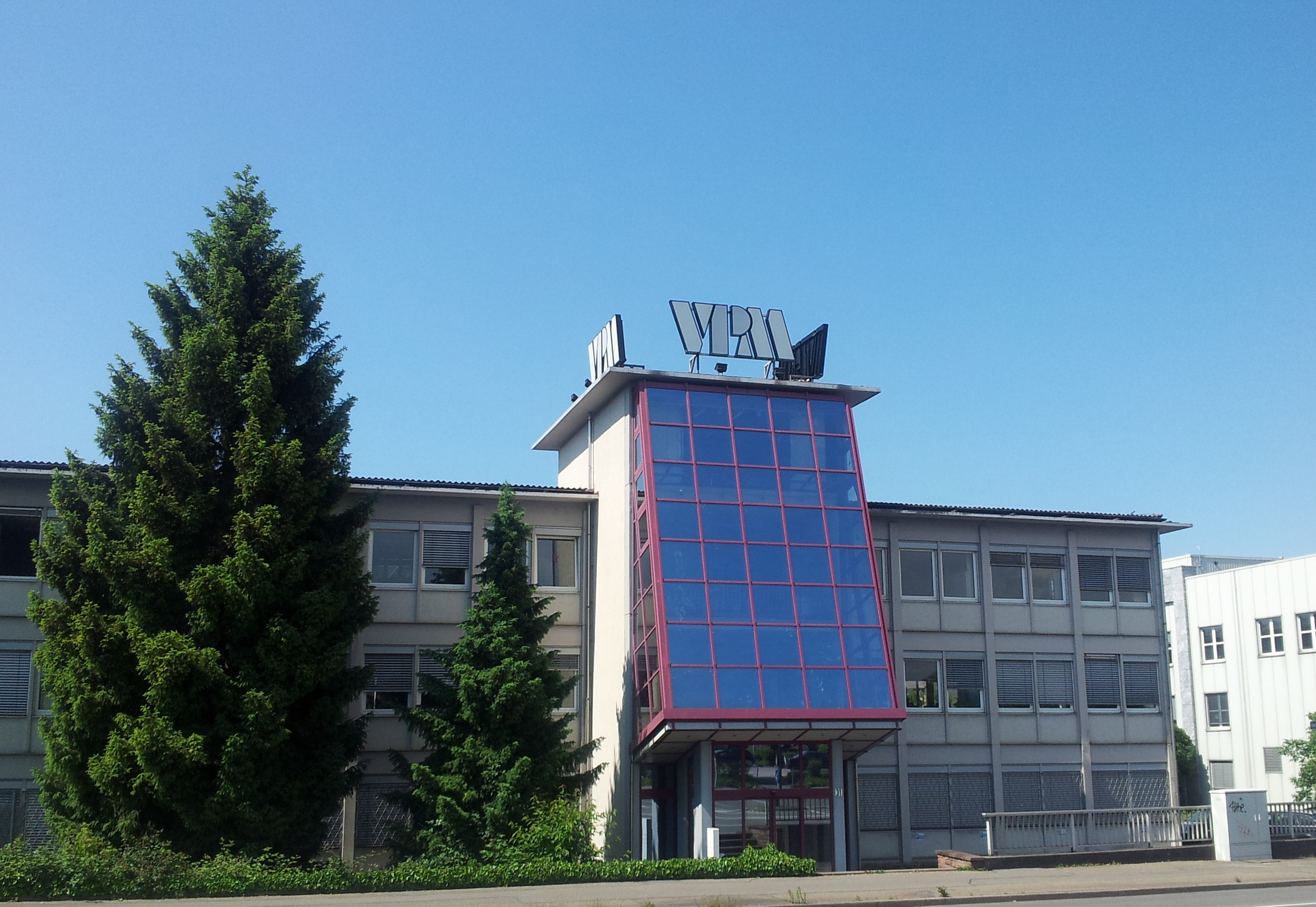 Firmensitz Pabel Möwig Rastatt